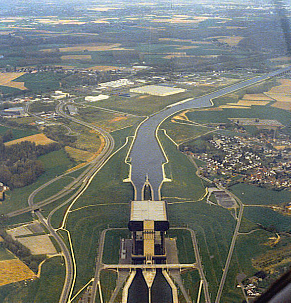 Scheepslift op het centrumkanaal